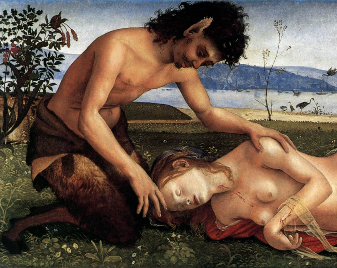 detail